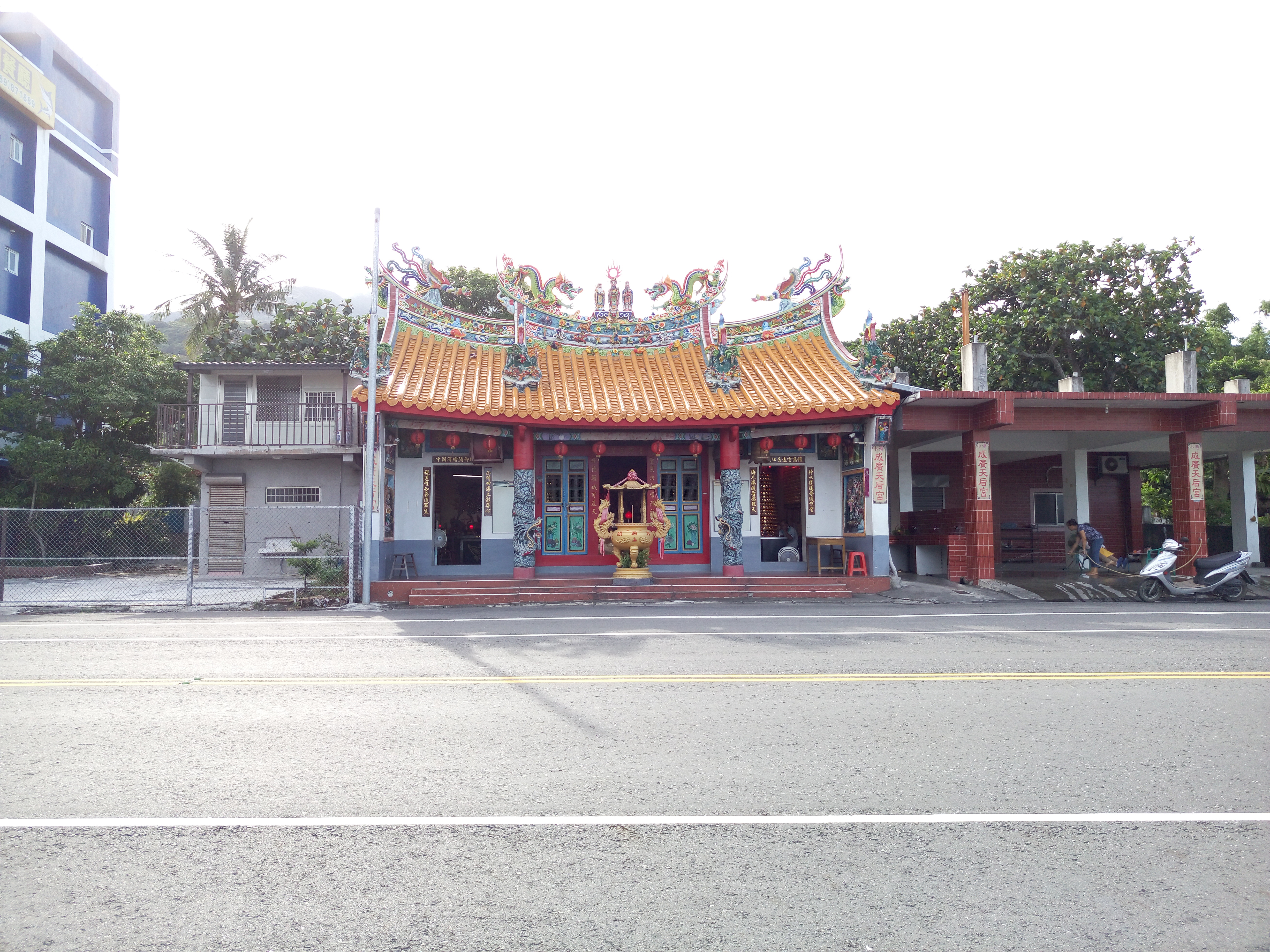 中文（台灣）: 成廣澳天后宮